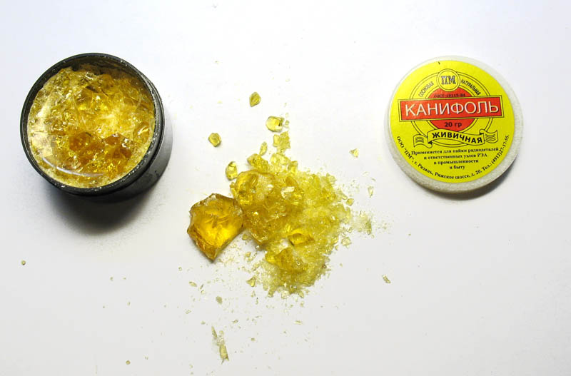 Флюс - канифоль